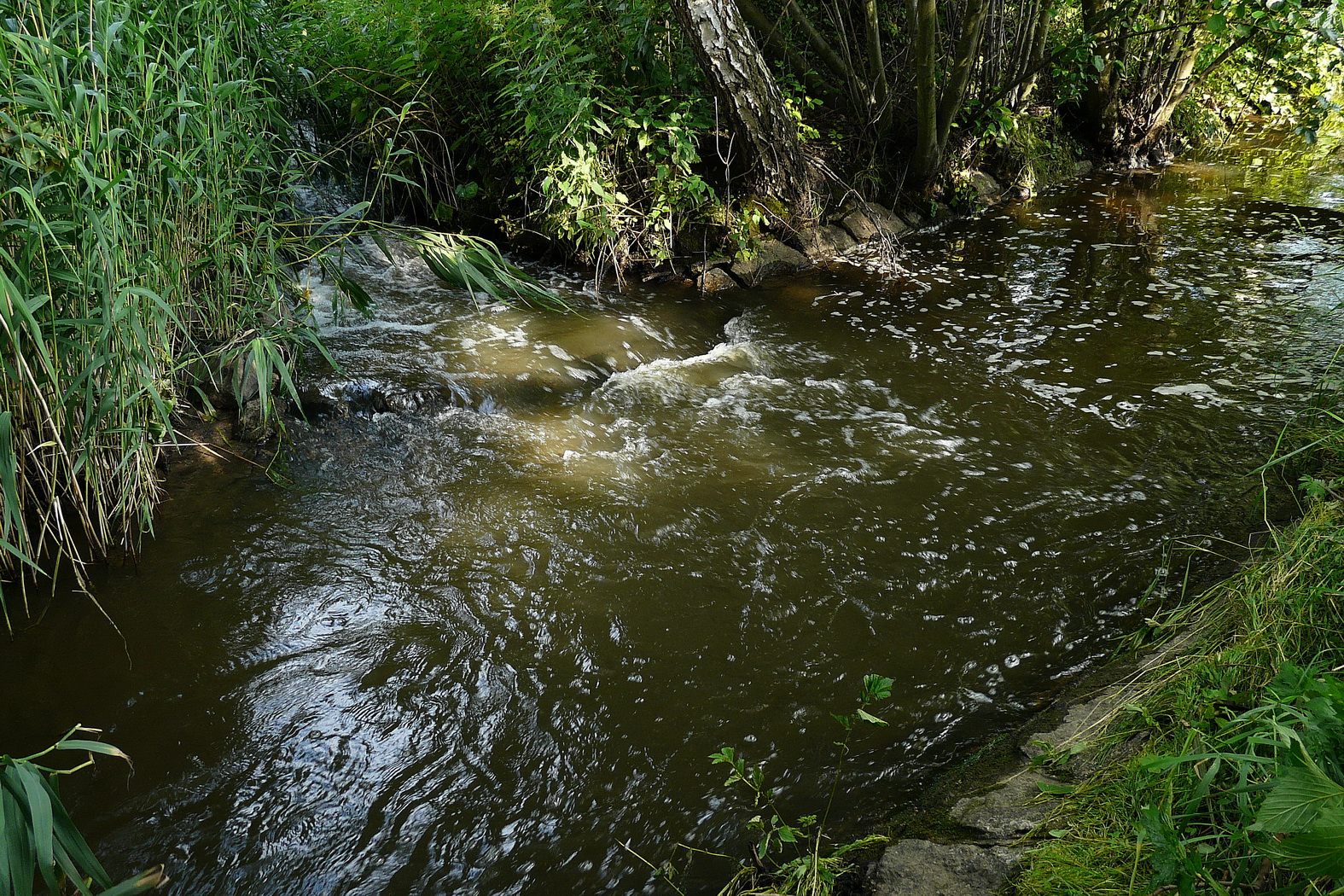 Soutok Kněžmostky s Koprnickým potokem